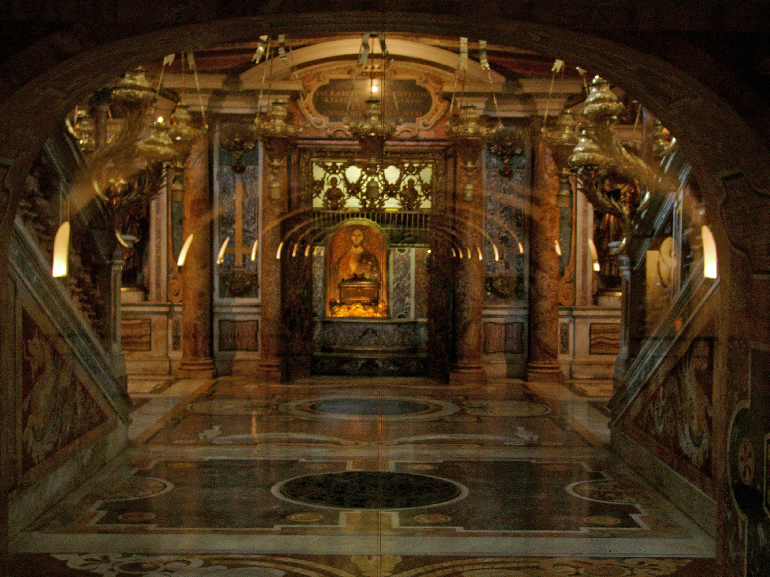 Das Petrusgrab im Petersdom in Rom